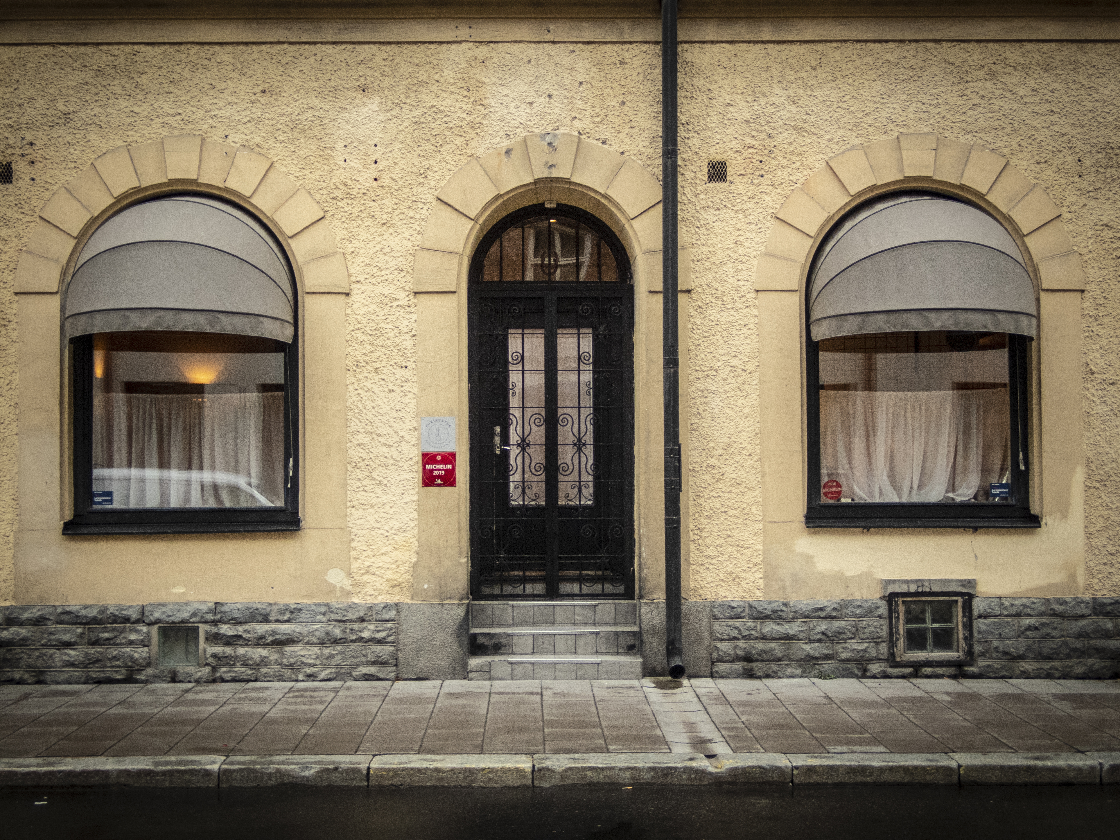 Restuarangen Agrikultur, Roslagsgatan 43 Stockholm